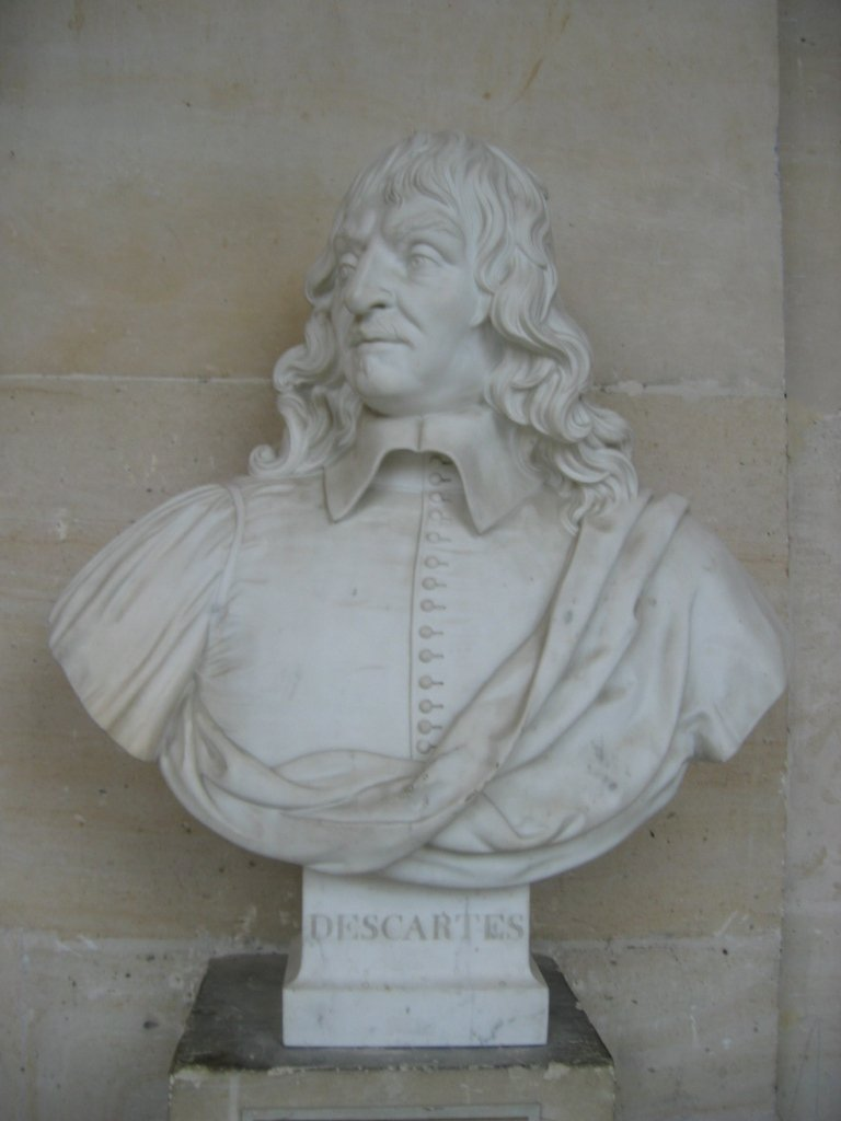 Buste de René Descartes sculpté par JS Brun en 1838 - Galerie du Chateau de Versailles